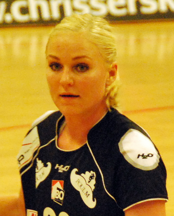 Håndboldspilleren Trine Troelsen fra FC Midtjylland Håndbold Her i en kamp mod Viborg HK i Viborg Stadionhal.